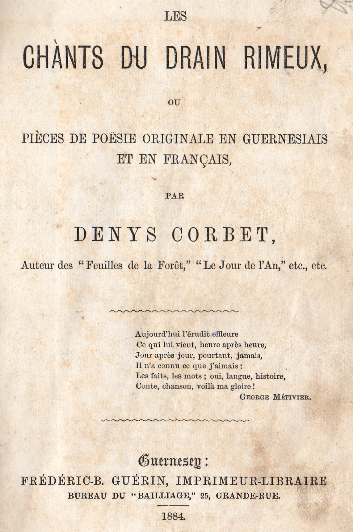 Title page "Les Chànts du Draïn Rimeux", Denys Corbet (died 1910)